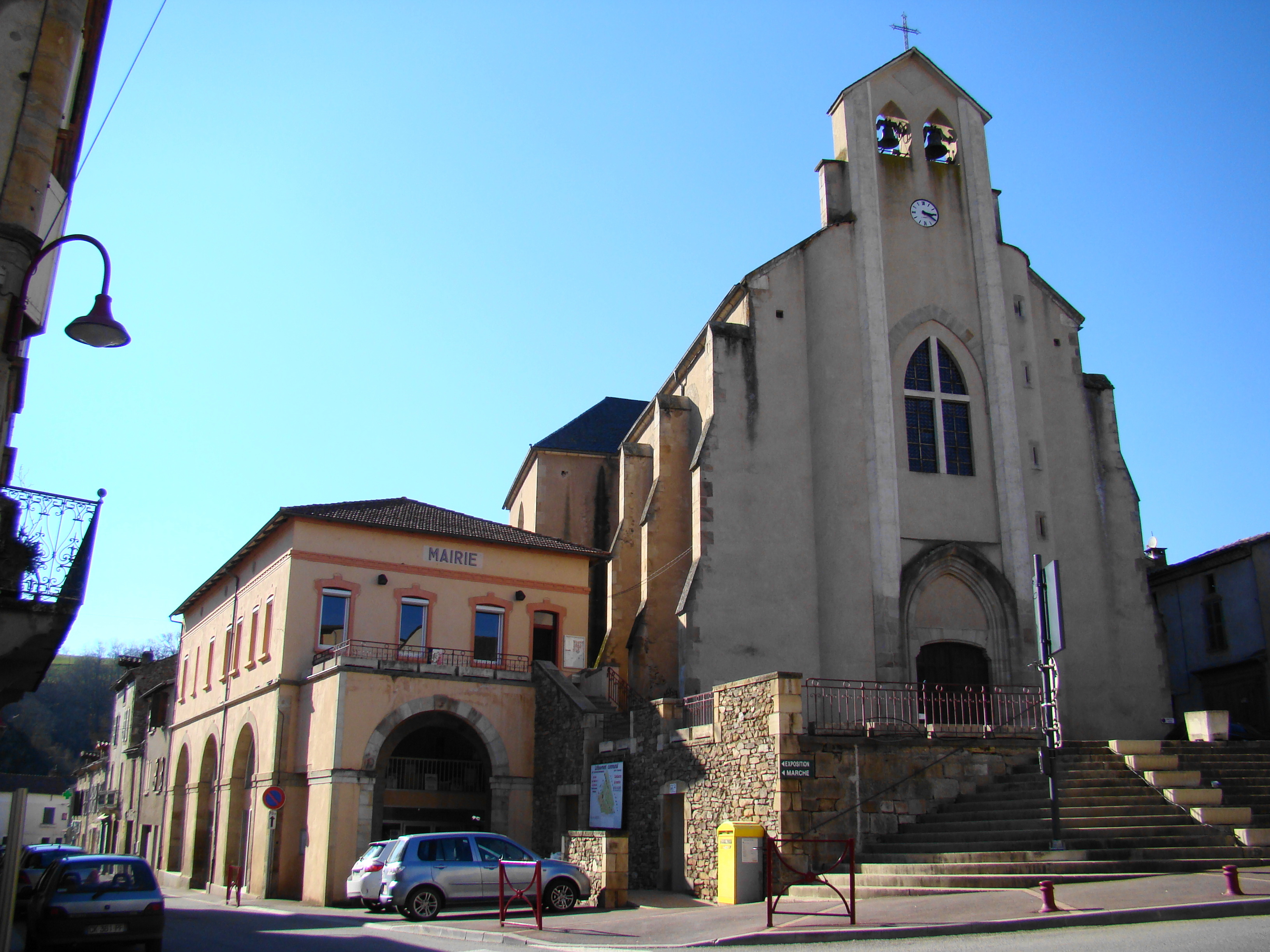 La mairie et l'église de Laguépie